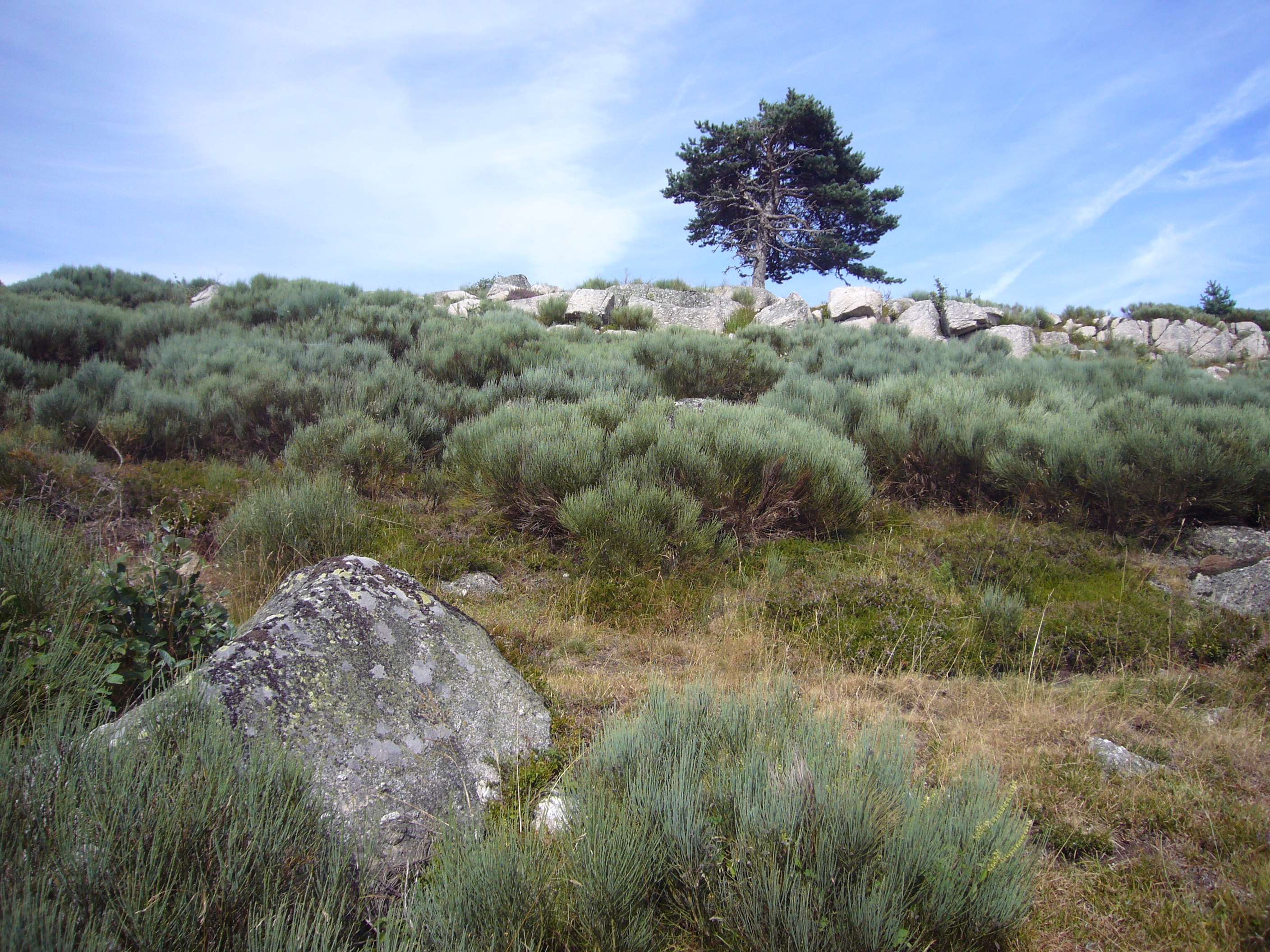 Genêt purgatif Cytisus oromediterraneus, monts d'Aubrac, France.